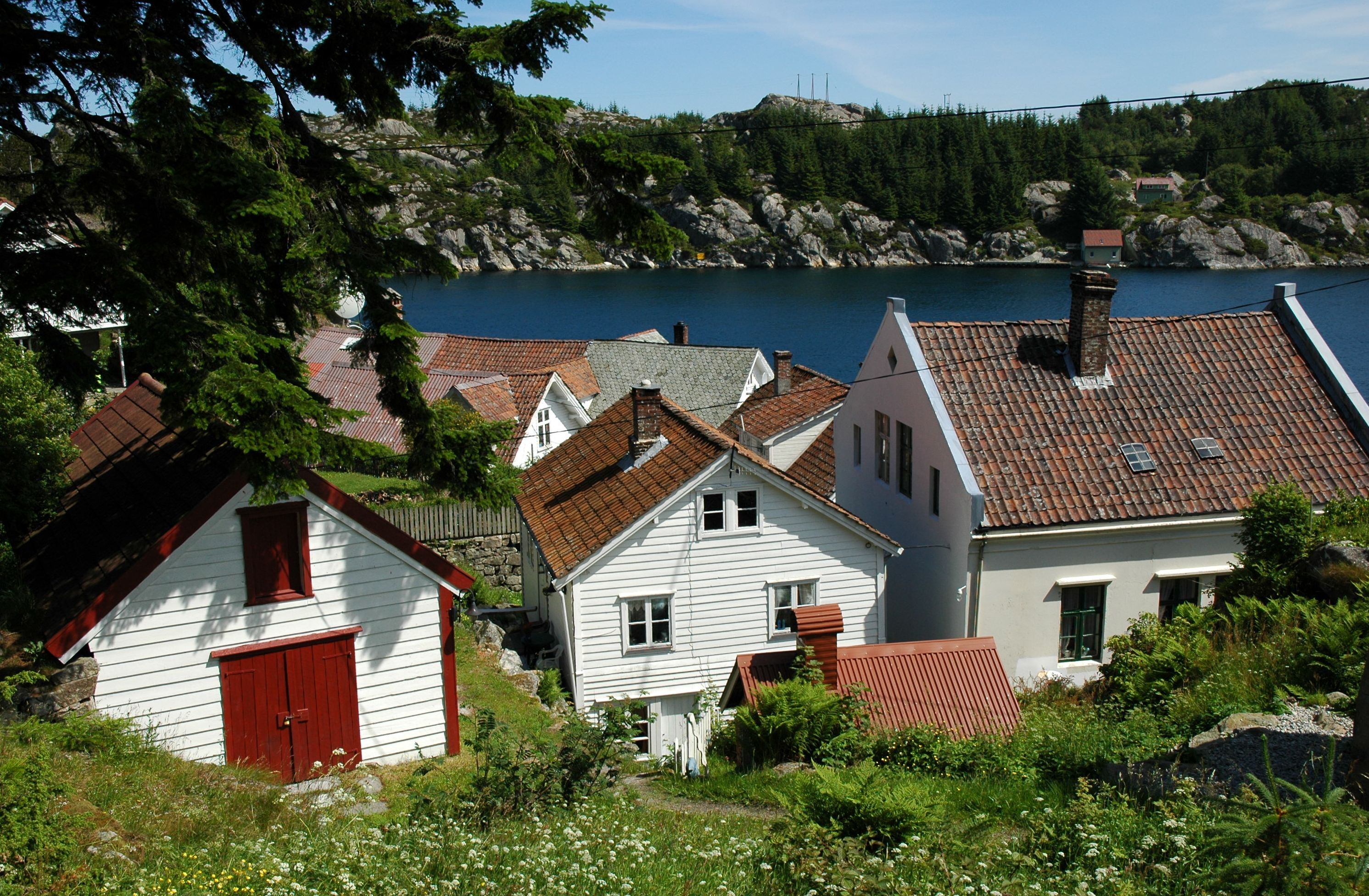 Den gamle handelsstaden Brandasund.